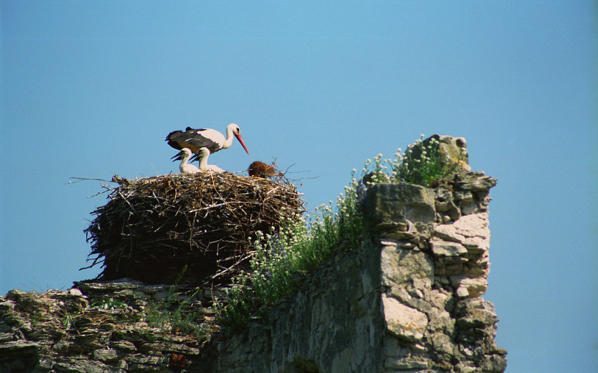 Mokrsko Górne, ruiny zamku